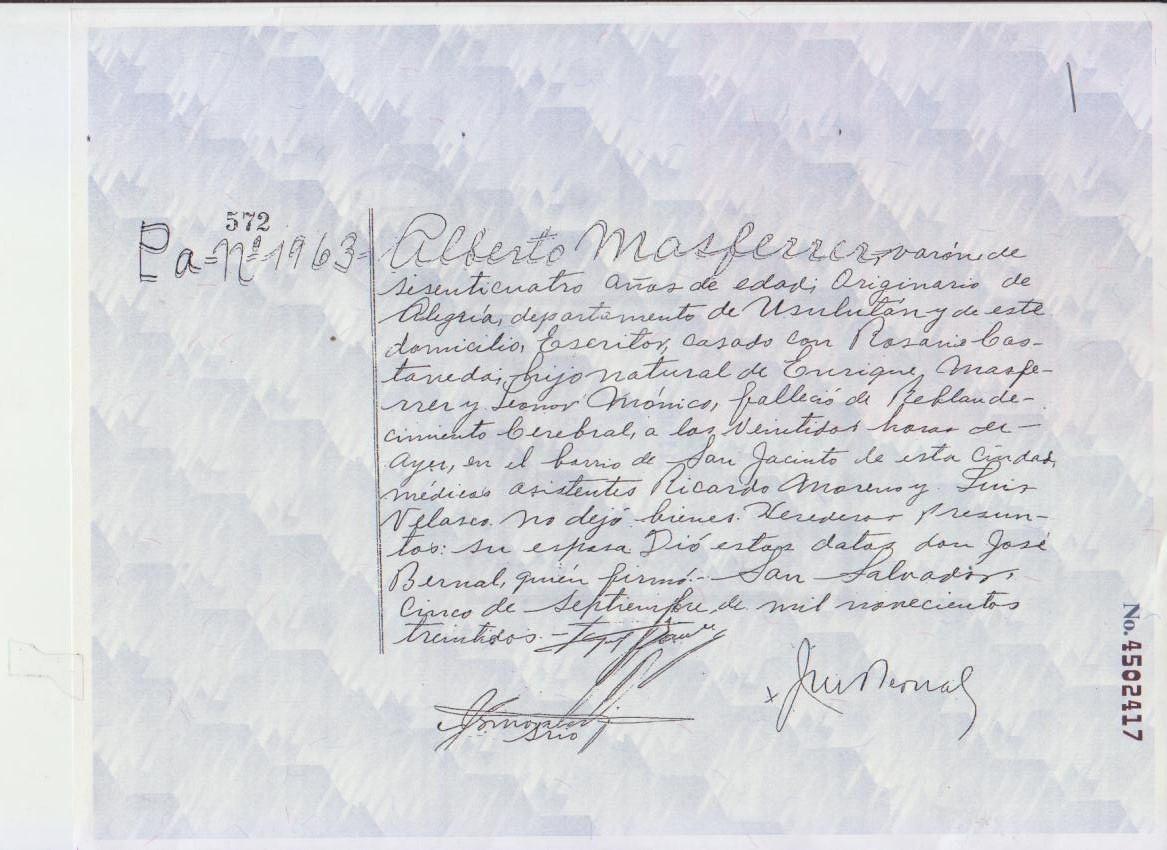 Partida de defunción del escritor salvadoreño Alberto Masferrer